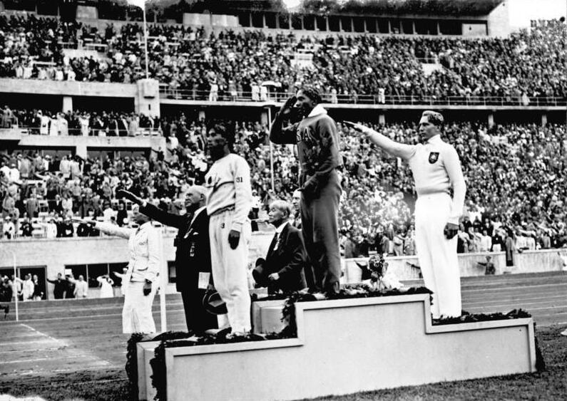 Sommerolympiade, Siegerehrung Weitsprung Olympische Spiele 1936 in Berlin, Siegerehrung im Weitsprung: Mitte Owens (USA) 1., links: Tajima (Japan) 3., rechts Long (Deutschland) 2., Zentralbild/Hoffmann